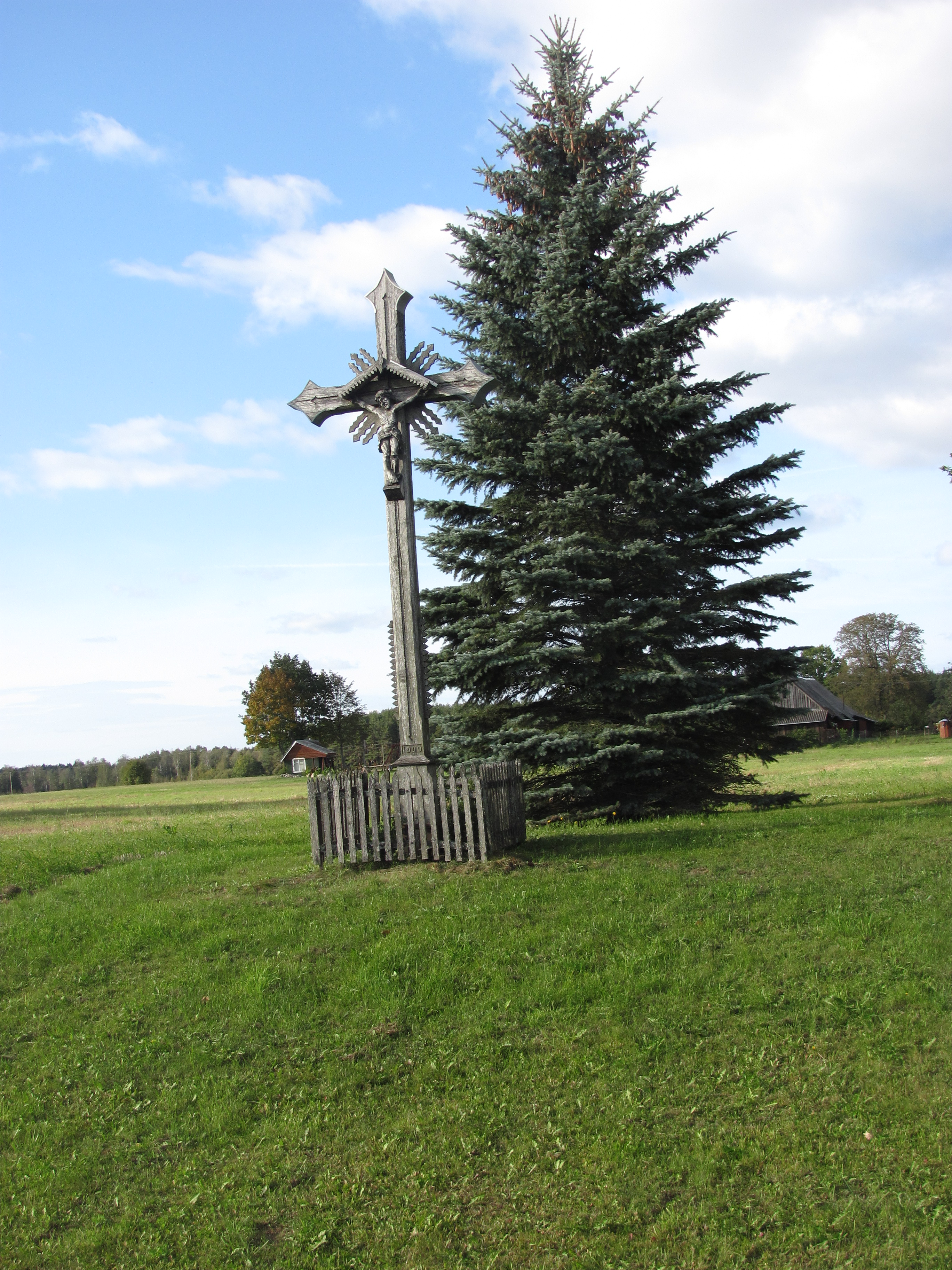 Jūžintų sen., Lithuania